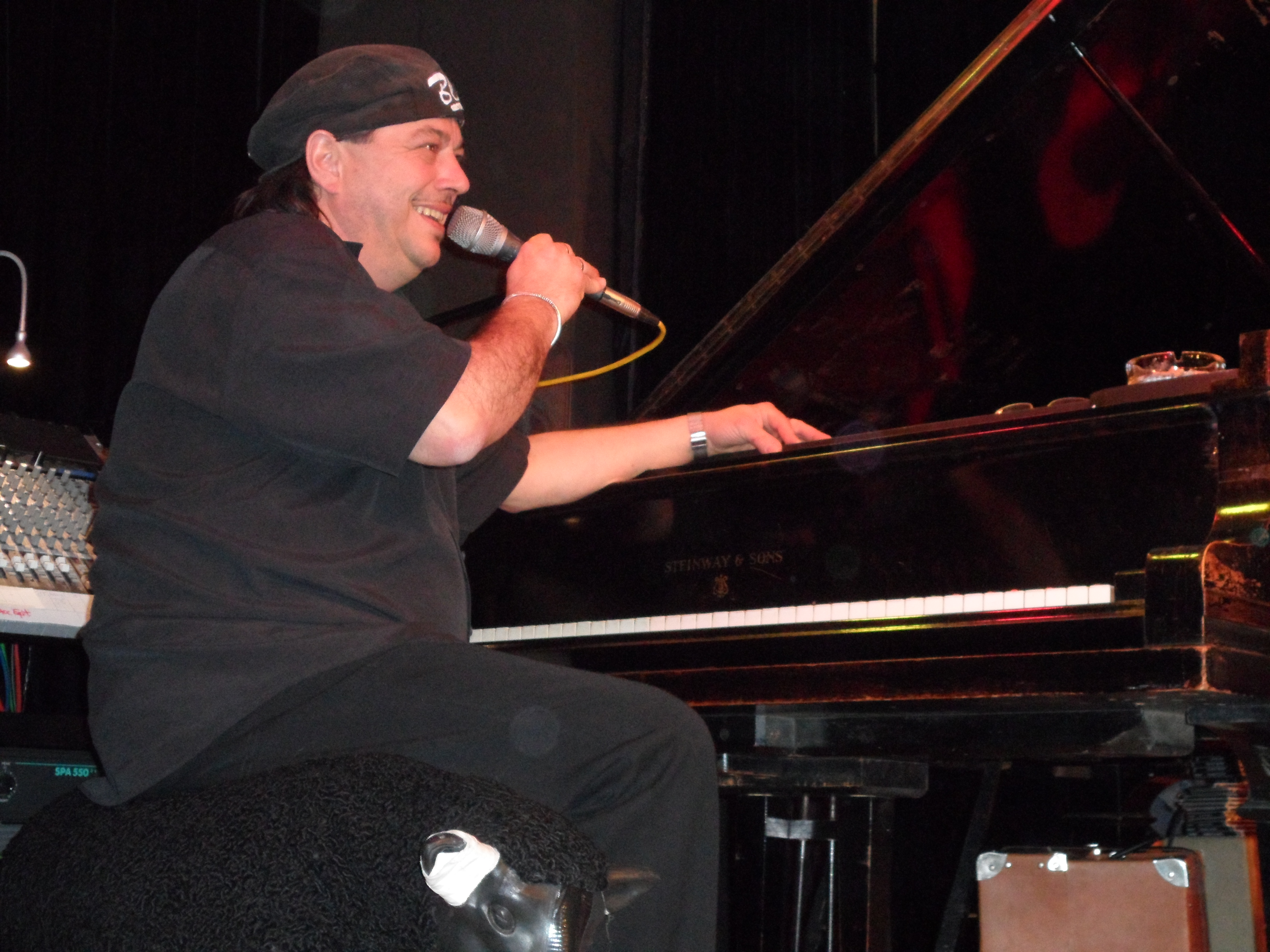 Konzert "Willisohn and friends" zum 50sten Geburtstag im INCONTRI in Rohrbach/Ilm